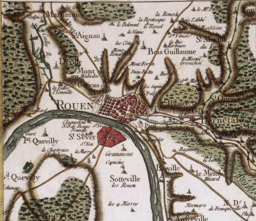 Carte Cassini de la métropole de Rouen du XVIIIe siècle.